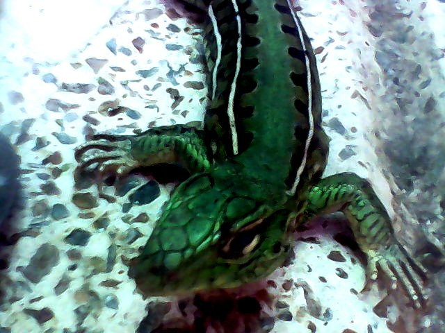 Teius Oculatus, o lagartija verde.